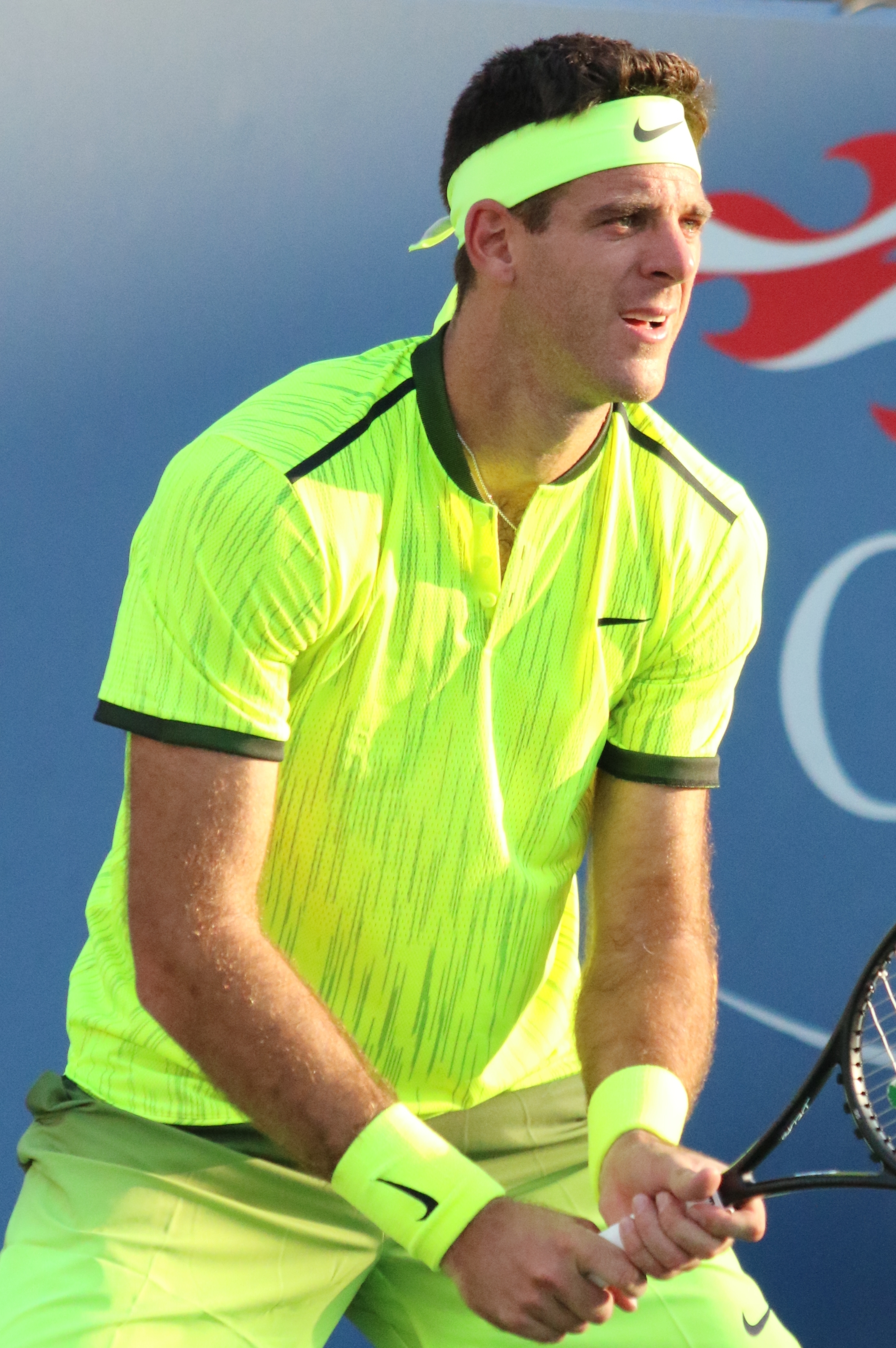 del Potro US16 (49)